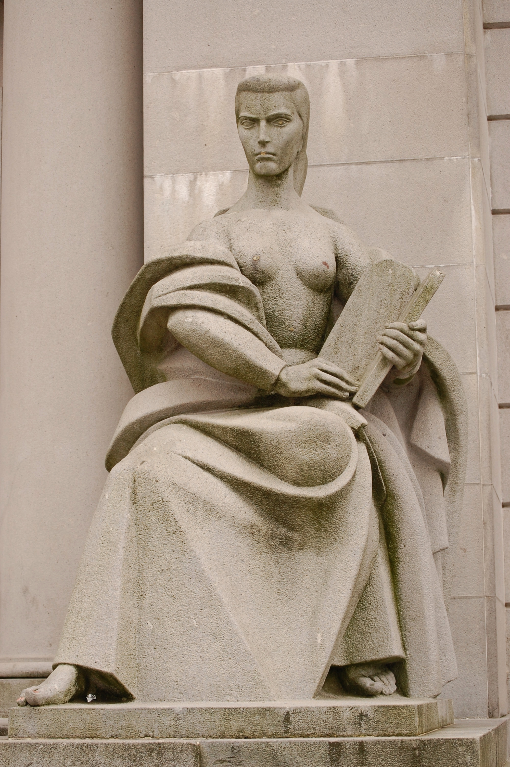 António Duarte, Lei. Estátua no exterior do Palácio de Justiça de Guimarães